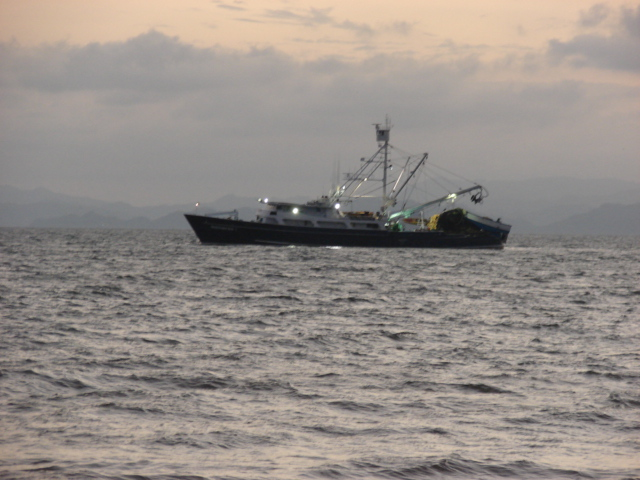 Barco atunero en la Bahía de Caldera, Puntarenas, Costa Rica.